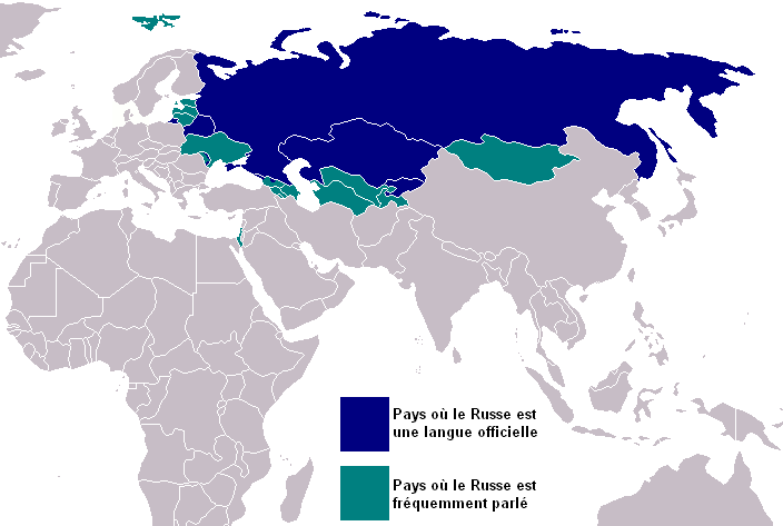 Modifié sous PhotoFiltre, à partir de l'image anglophone.